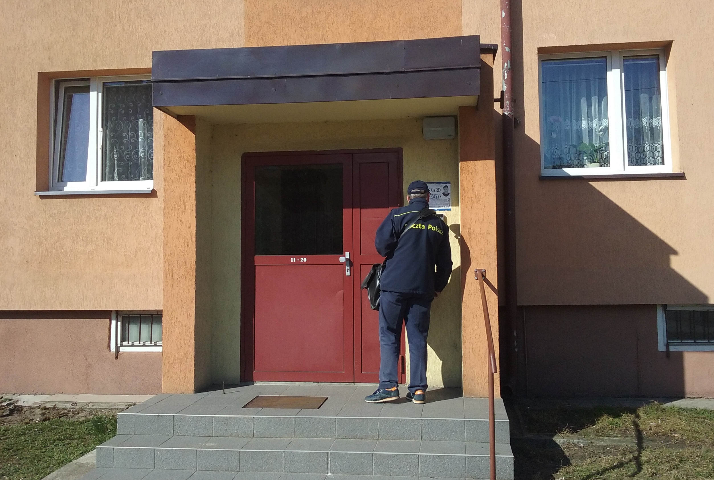 Listonosz Poczty Polskiej na jednym z blokowisk w 60-tysięcznym Tomaszowie Mazowieckim